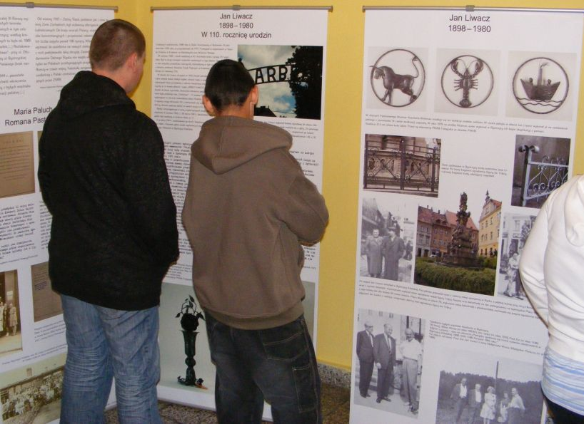 fragment wystawy Nasze Korzenie" w Bibliotece Publicznej Miasta i Gminy Bystrzyca Kłodzka (zob. Jan Liwacz)